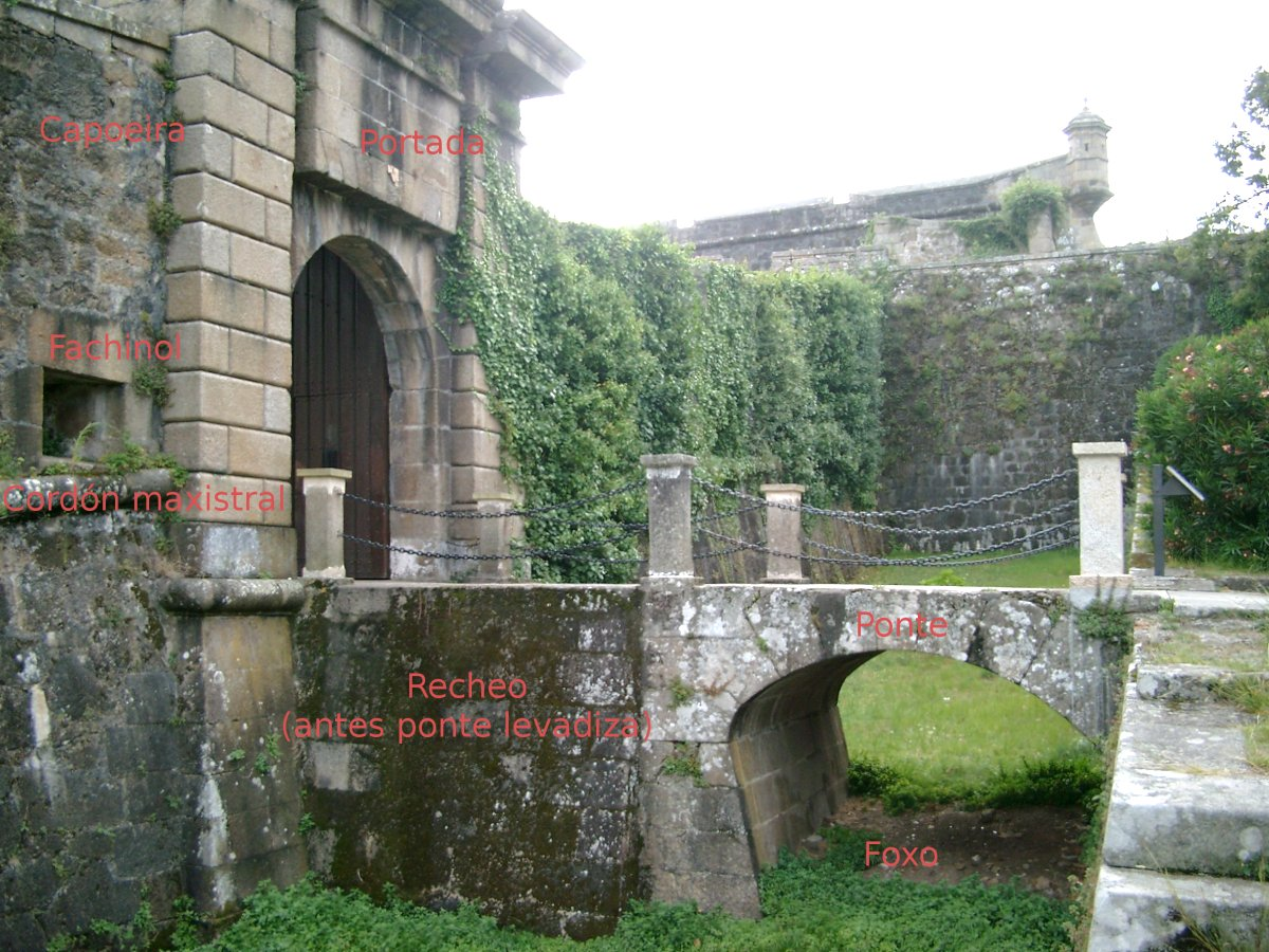 Portada Leste do Castelo de San Filipe en Ferrol